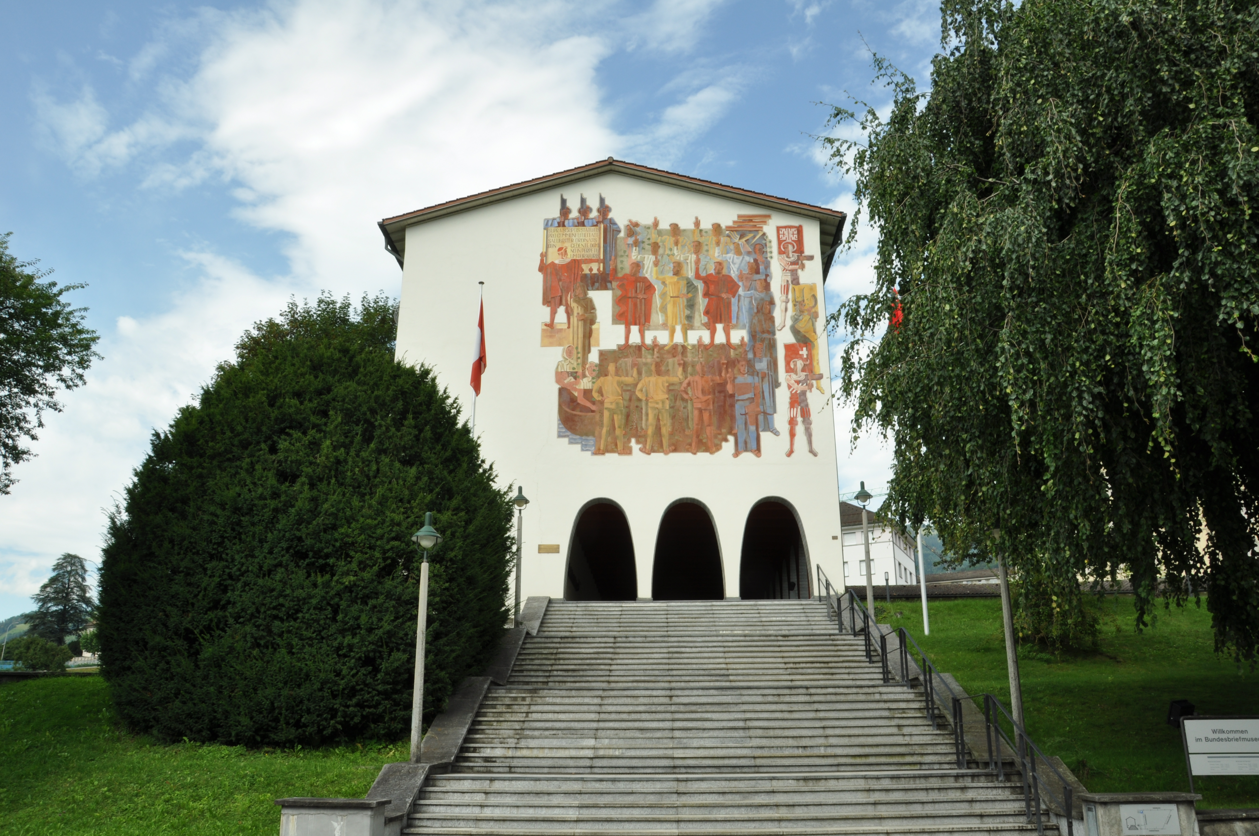 Schwyz Bundesbriefmuseum